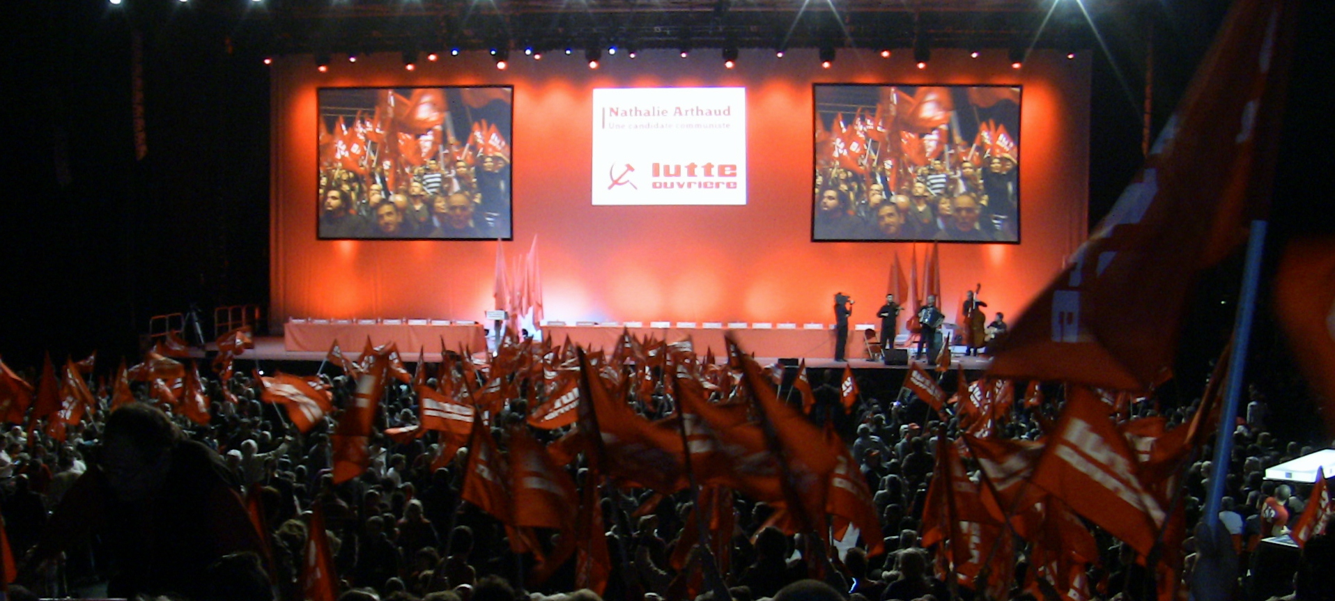 Public et scène du Zénith de Paris pour le meeting de Lutte Ouvrière le dimanche 15 avril 2012.